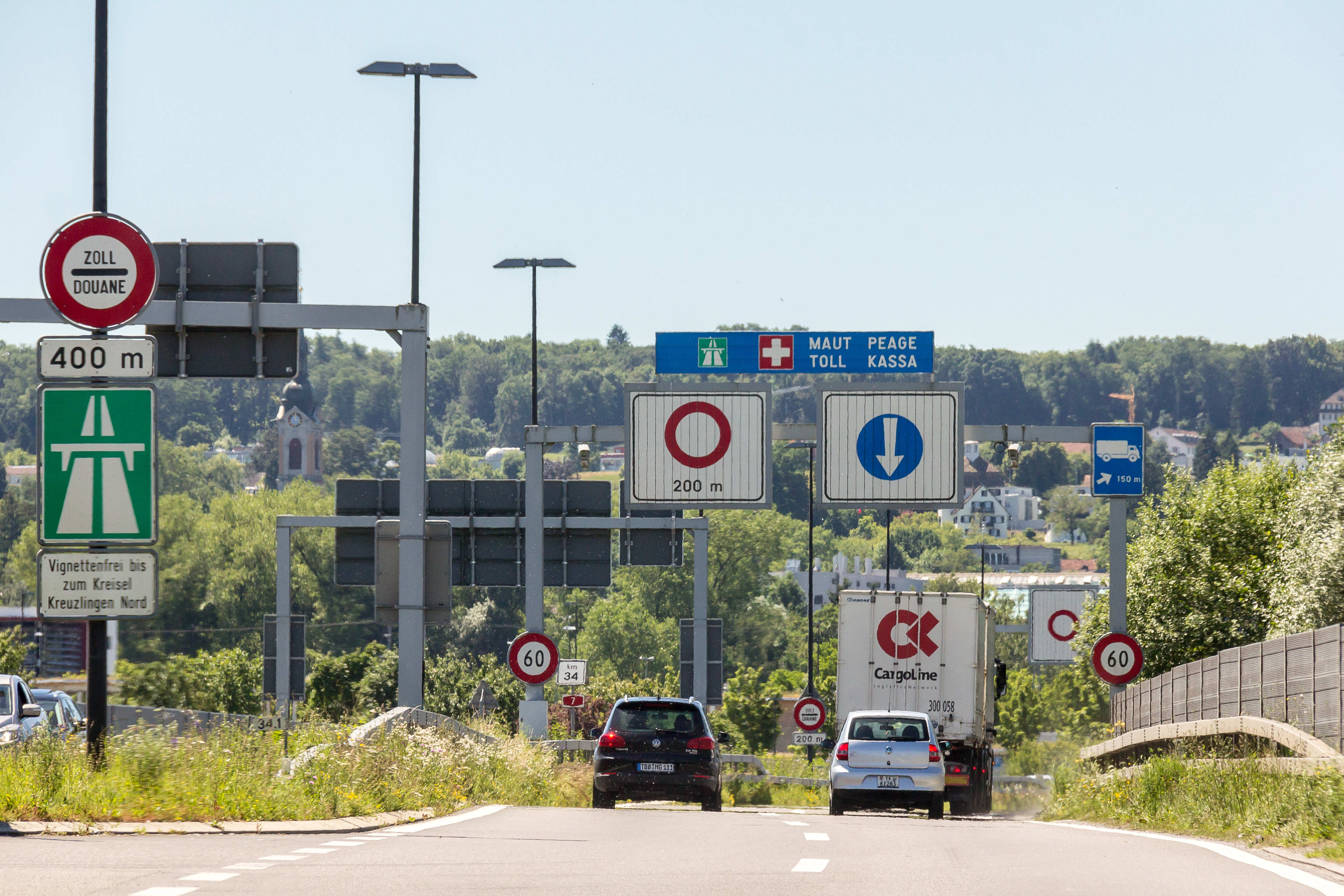 Auf der B 33n kurz vor der Deutsch-Schweizer Grenze in Konstanz. Hinweisschilder auf die Mautpflicht in der Schweiz